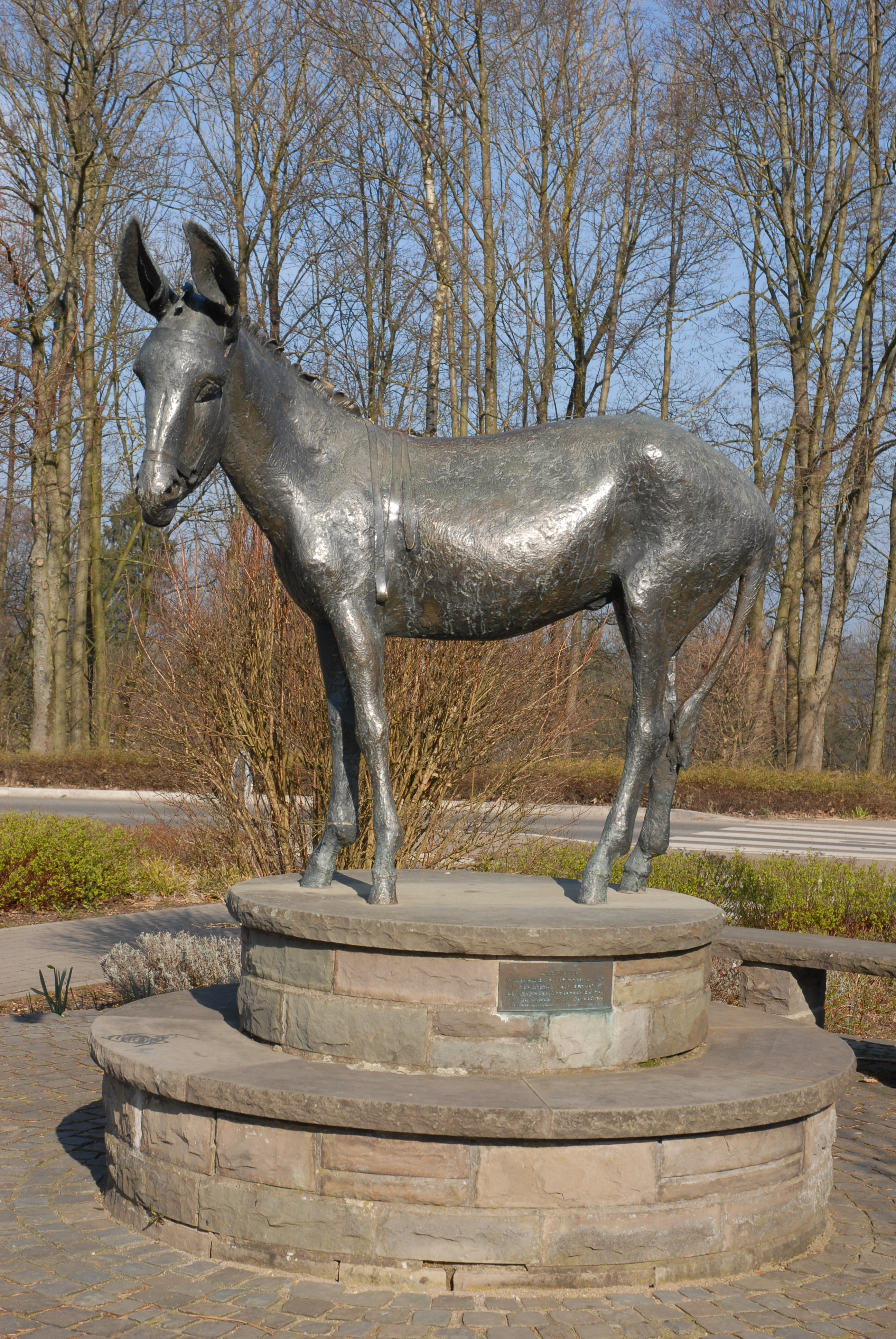 Das Wahrzeichen Bechens von der Bildhauerin Heide Dobberkau, aufgestellt am 20. August 1983 an der Kreuzung Kölner und Odenthaler Straße